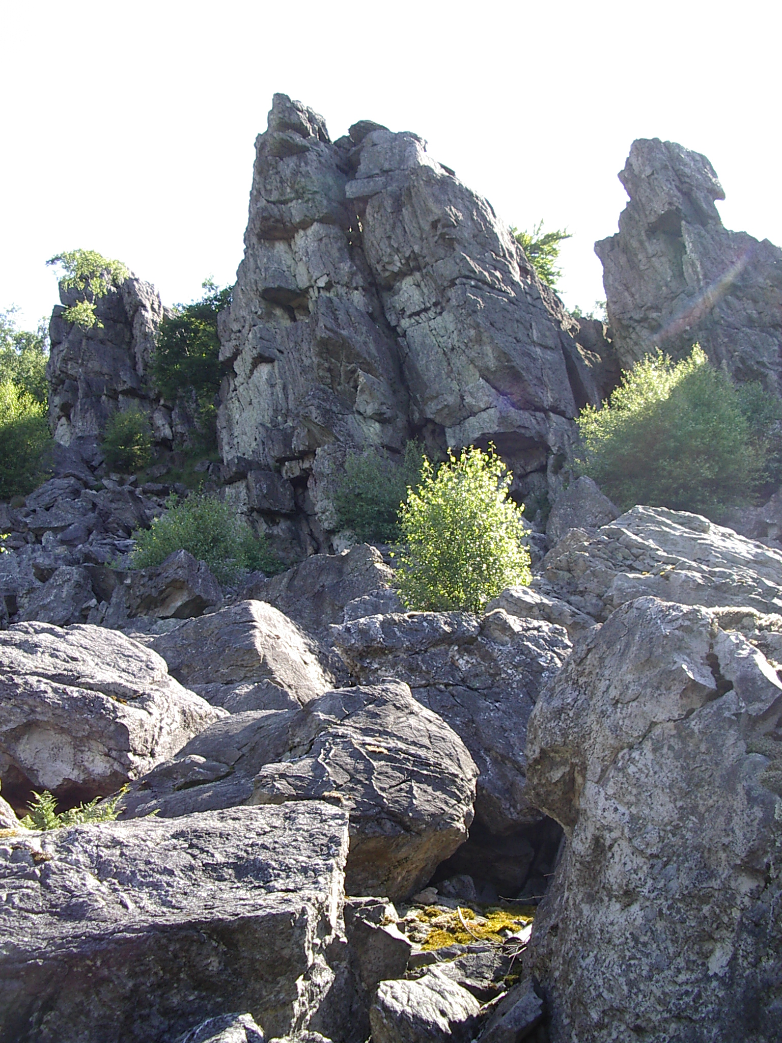 Site Dit Roc la Tour, Monthermé, Ardennes, France.